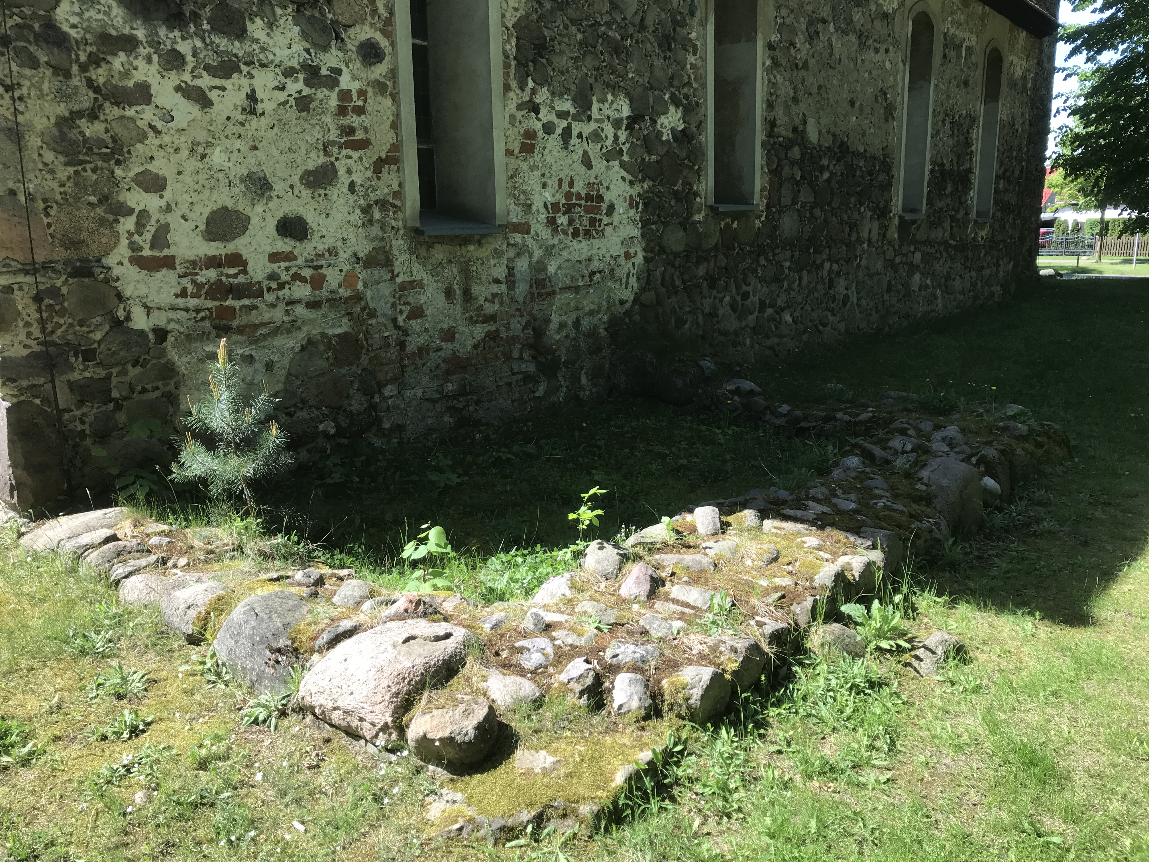 Die Dorfkirche in Rauen ist eine Feldsteinkirche aus dem 15. Jahrhundert im Landkreis Oder-Spree im Land Brandenburg